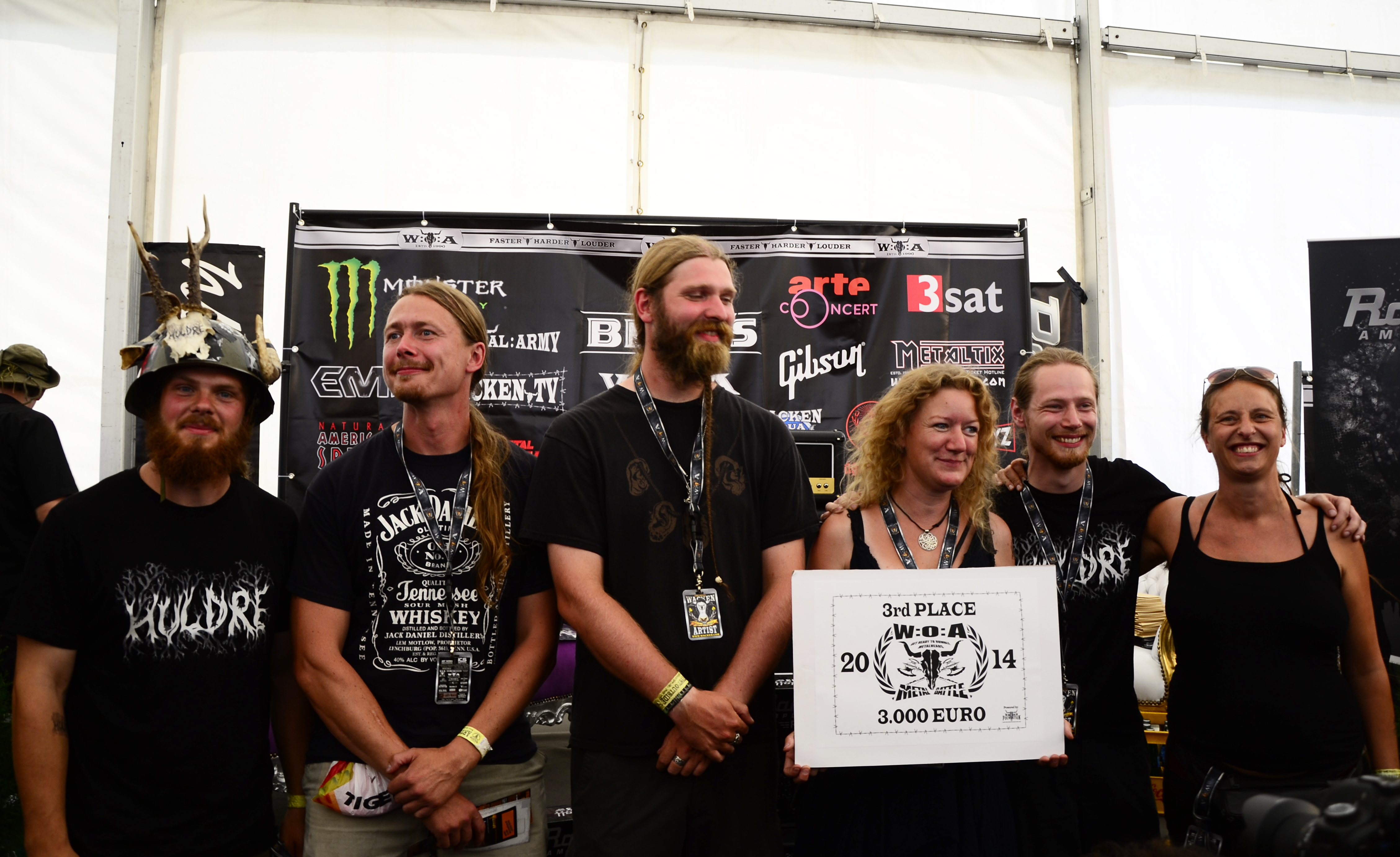 Die Gewinner des 3. Platzes beim Metal Battle 2014 Huldre aus Dänemark bei der Preisverleiung beim Wacken Open Air 2014